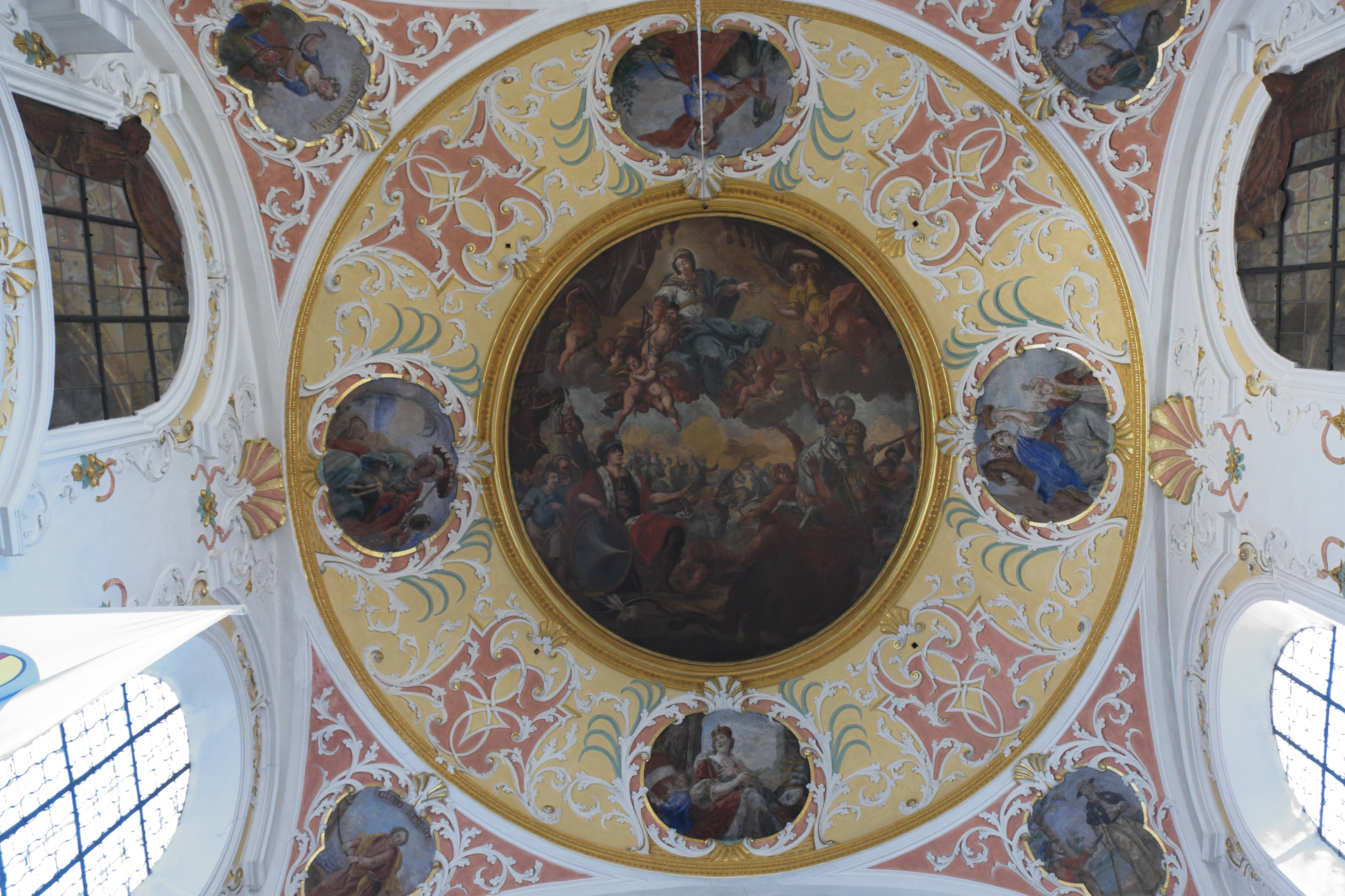 Katholische Pfarrkirche Sankt Peter und Paul in Oberigling (Igling) im Landkreis Landsberg am Lech (Bayern/Deutschland), Kuppel im Chor, Leinwandgemälde von Johann Andreas Bergmüller, von 1735; Darstellung: Maria als Beschützerin vor den Türken mit dem Gürtel der Bruderschaft Maria vom Trost